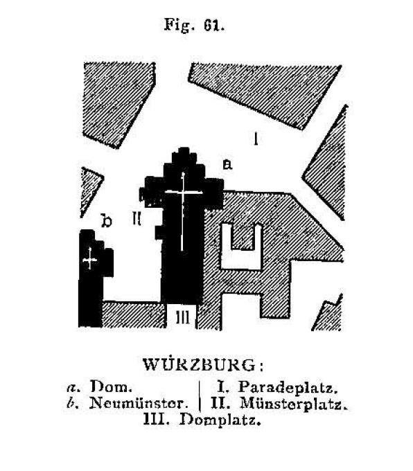 Camillo Sitte maakte deze analysetekening uit het centrum van Würzburg als één van de plekken voor de studie naar middeleeuwse stedenbouw, gepubliceerd in zijn werk Der Städtebau nach seinen künstlerischen Grundsätzen (1889)